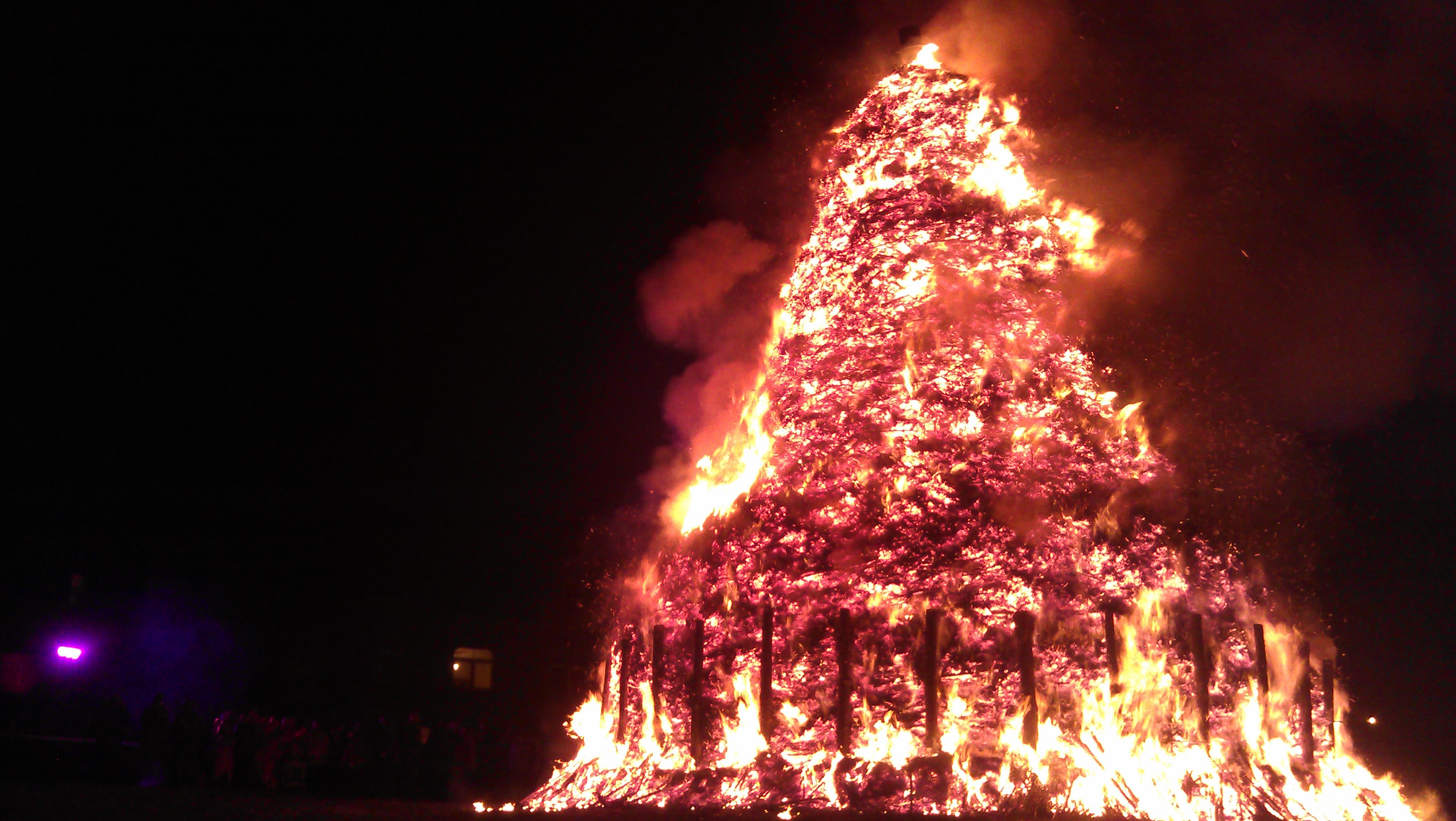 Le traditionnel grand feu de Bouge (Namur)